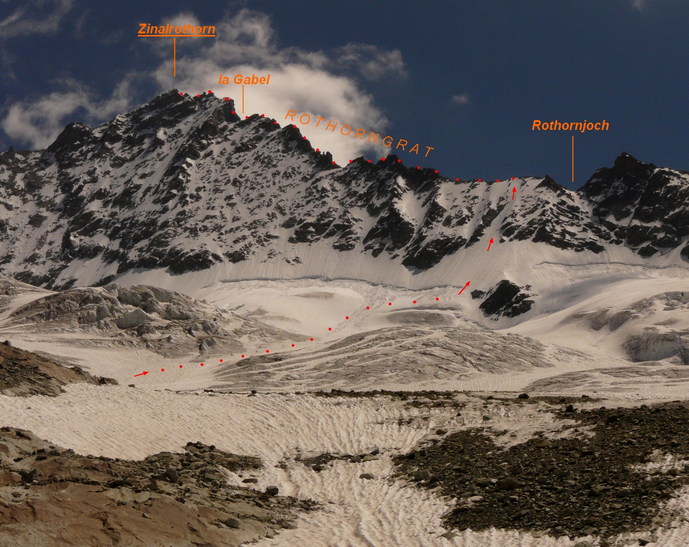 Indicazioni della Rothorngrat al Zinalrothorn dal versante di Zinal